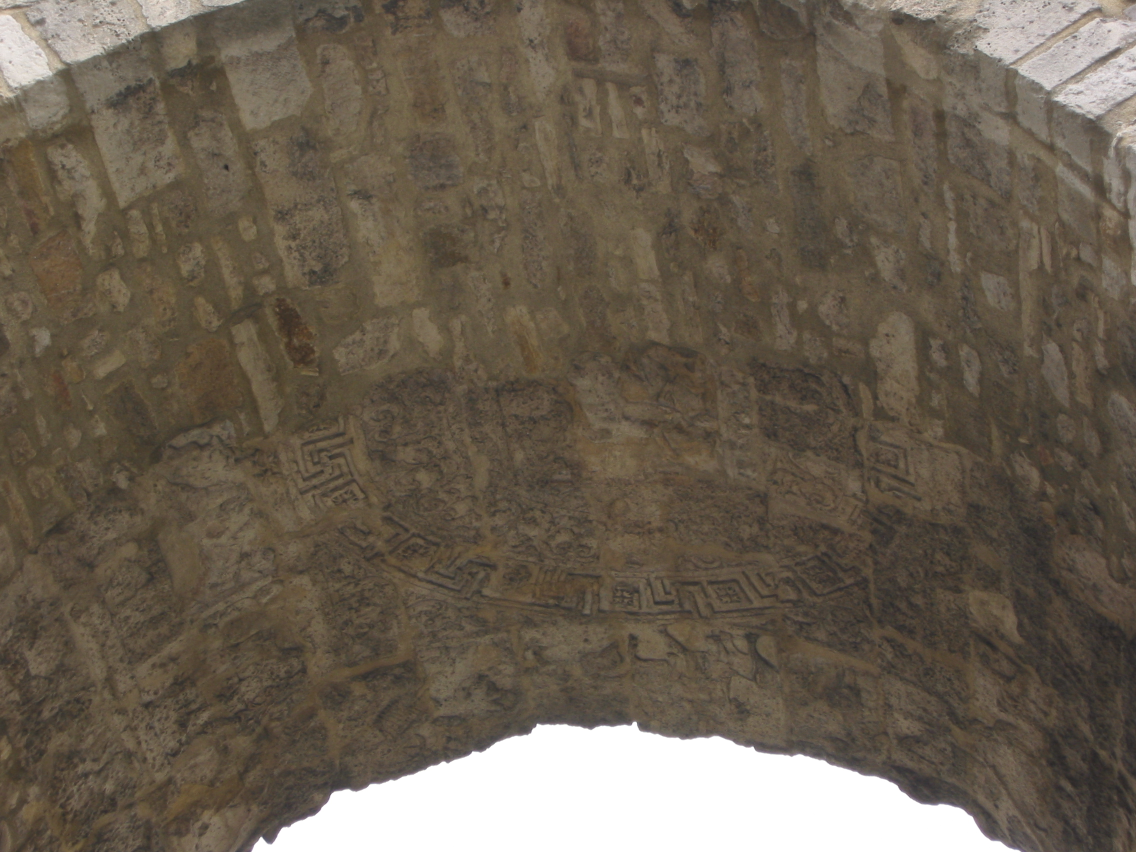 Reims, France.